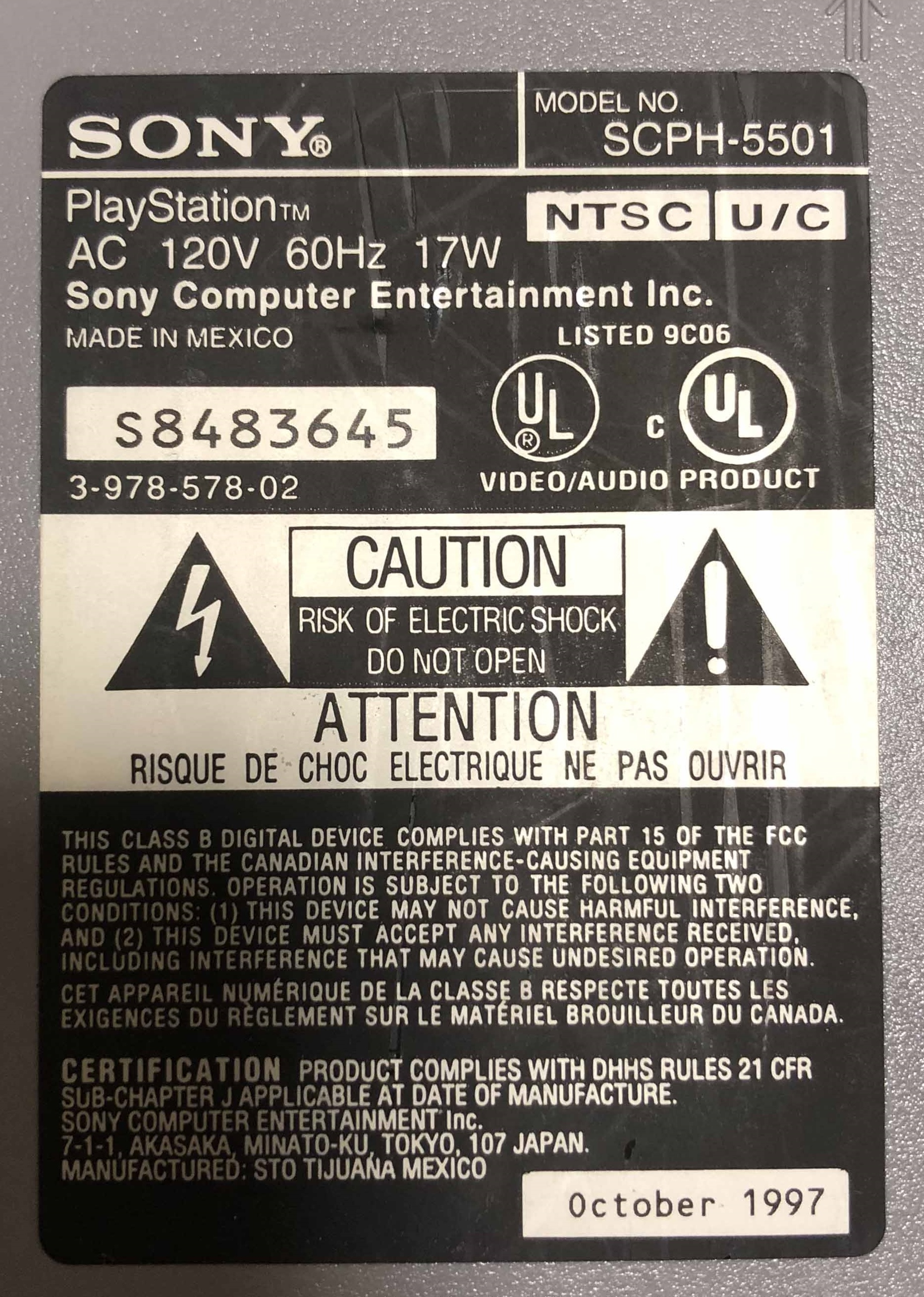 PlayStation 北米地域用 NTSC U／C型 SCPH-5501の裏面